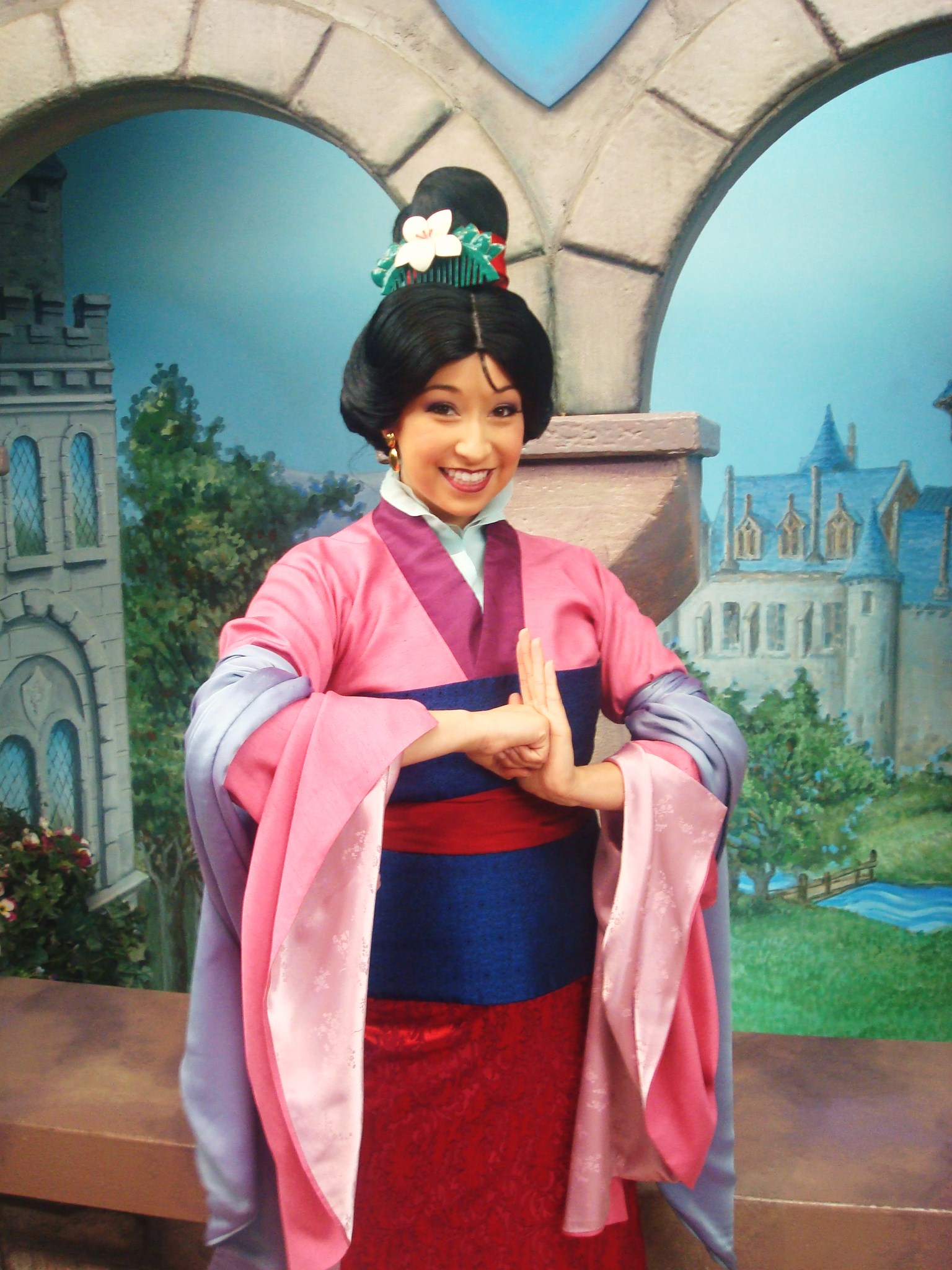 Mulan meet-and-greet at Disneyland.